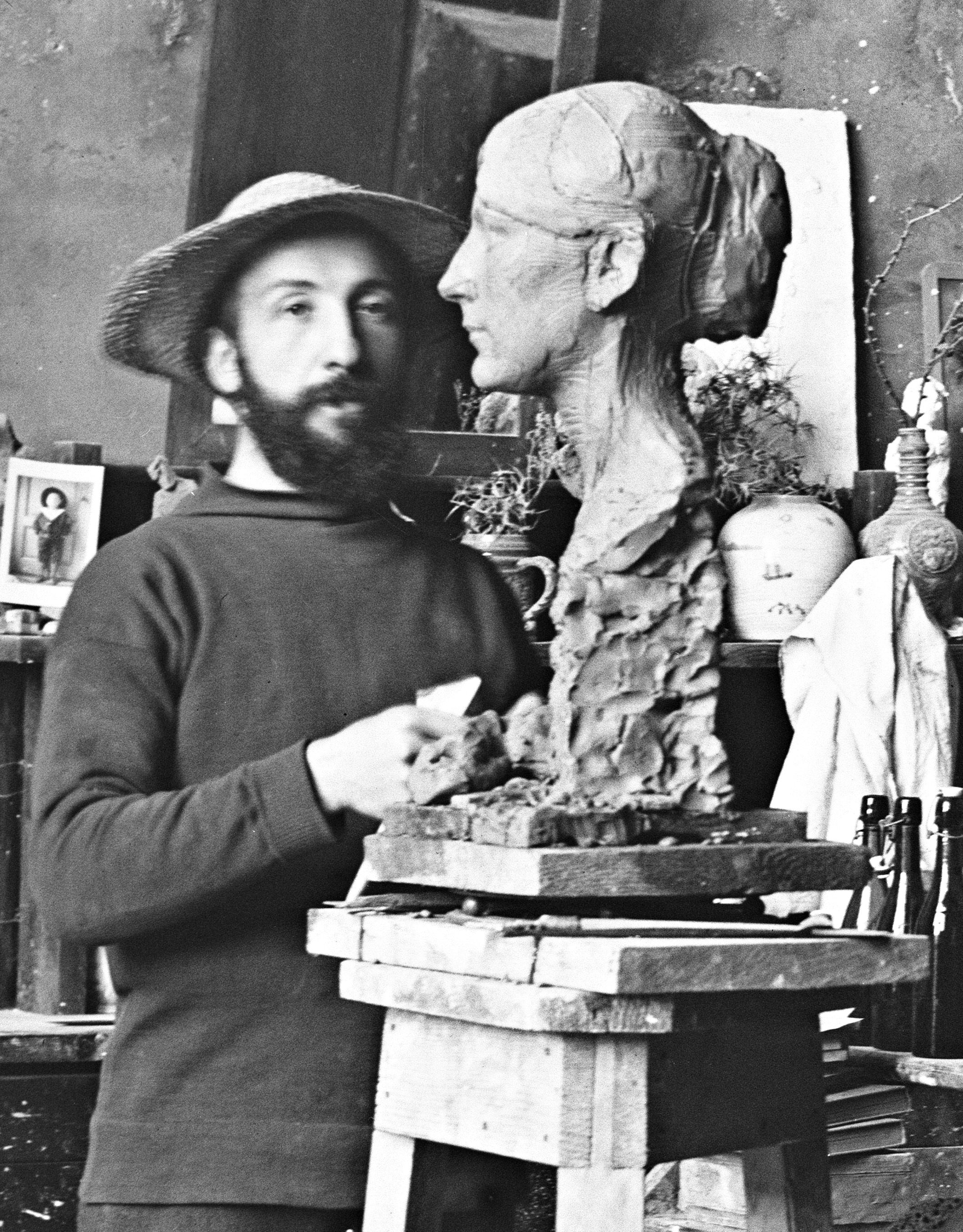 Eduard Jacobs in zijn atelier (1894), foto van Jacob Olie